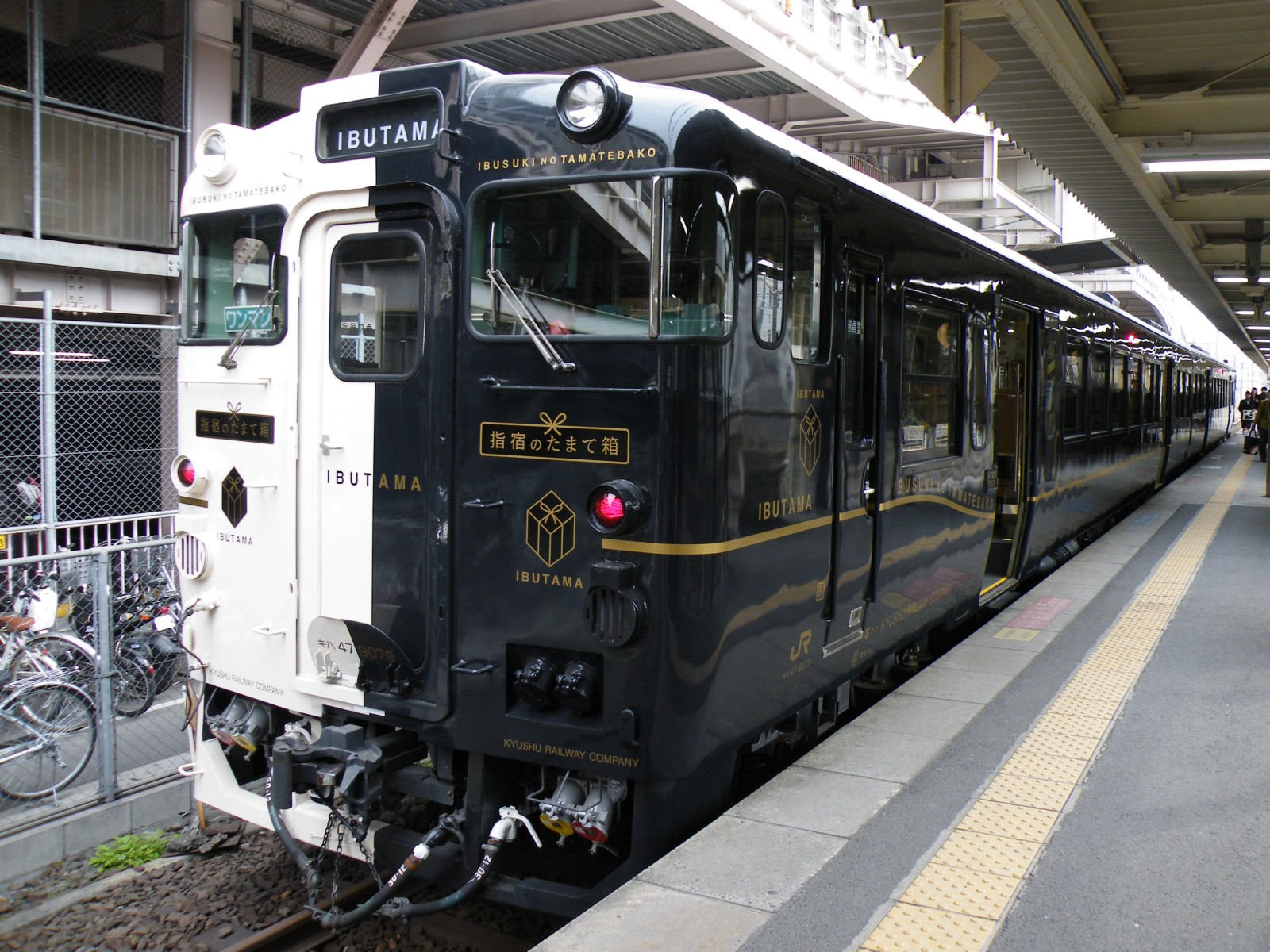 特急「指宿のたまて箱」（鹿児島中央駅にて、臨時公開時）